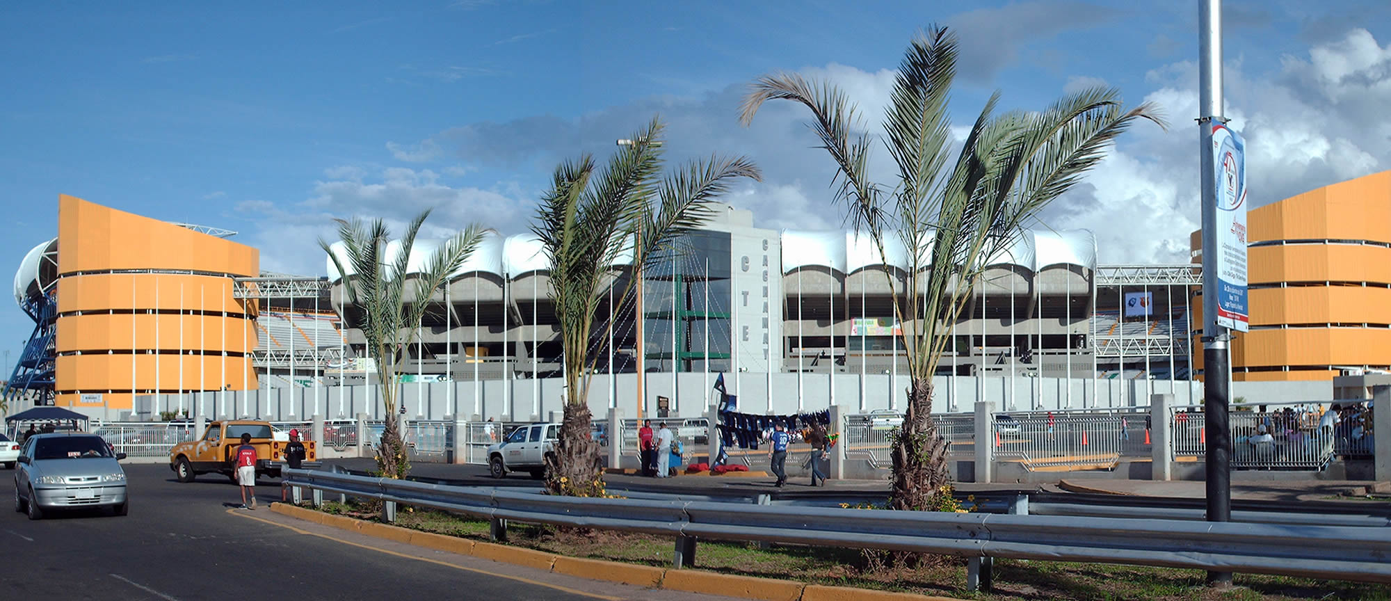 Entrada Principal de CTE Cachamay // Main Entrance of CTE Cachamay